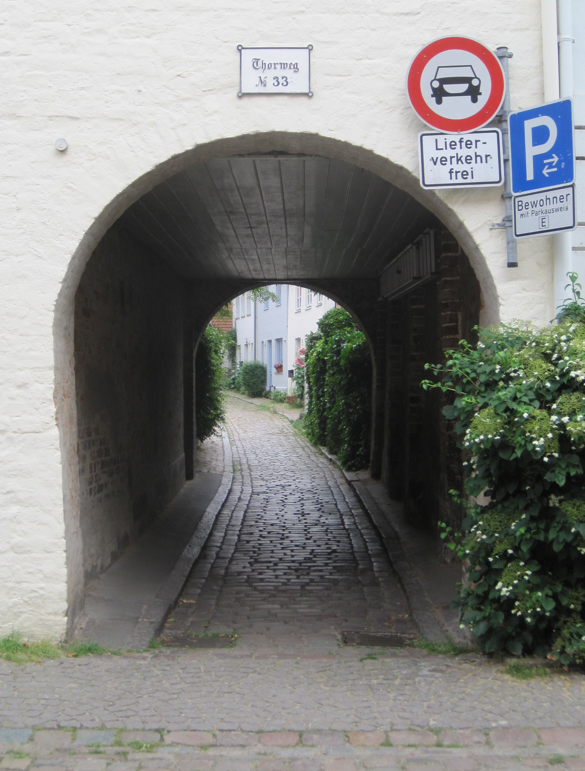 Thorweg in der Engelswisch 33 in Lübeck